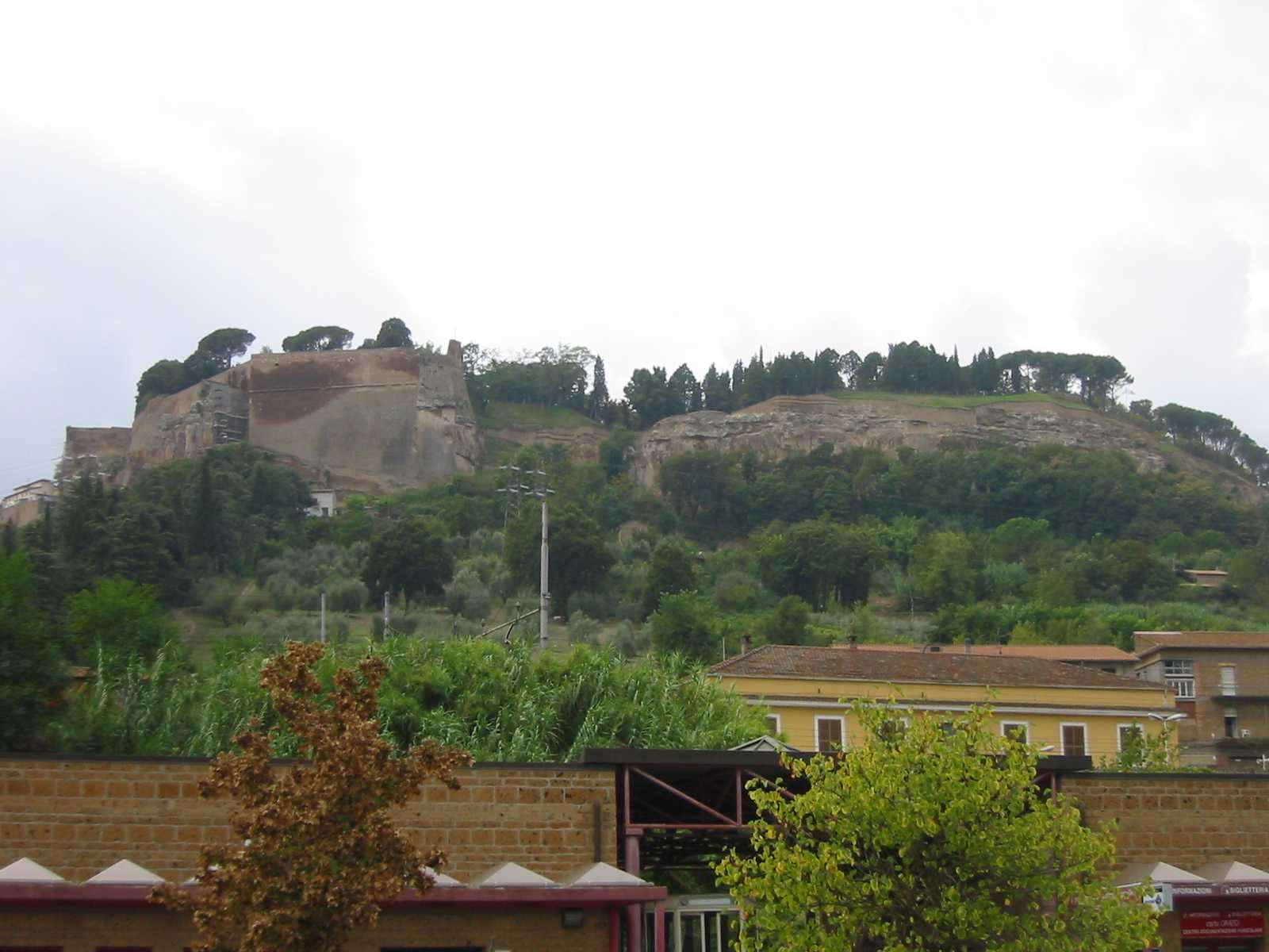 Orvieto